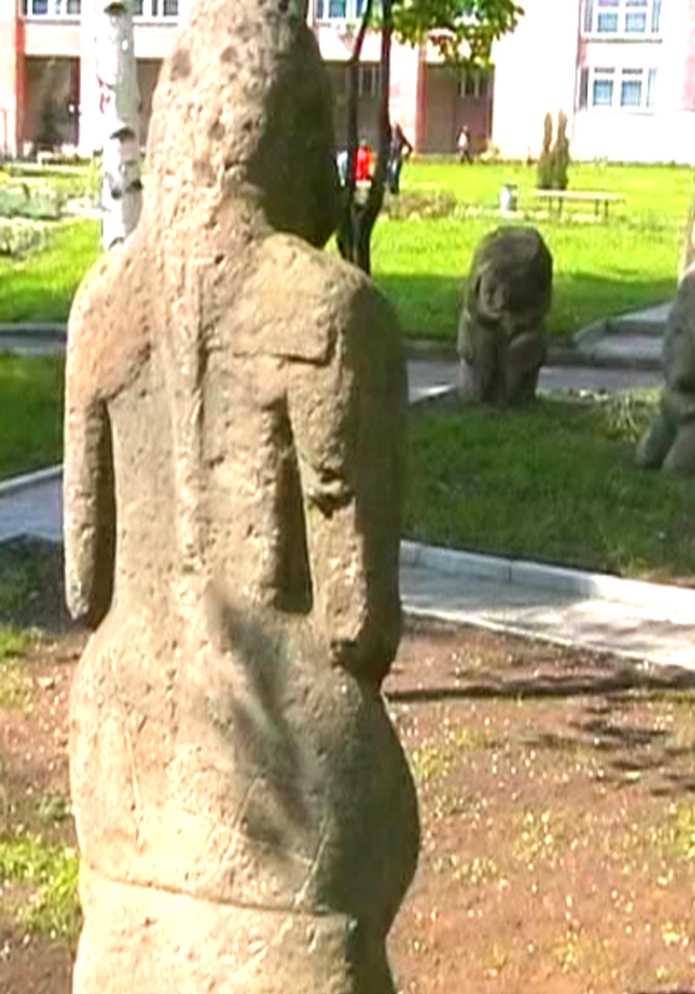 Kipchak stone baba (Ukraine)